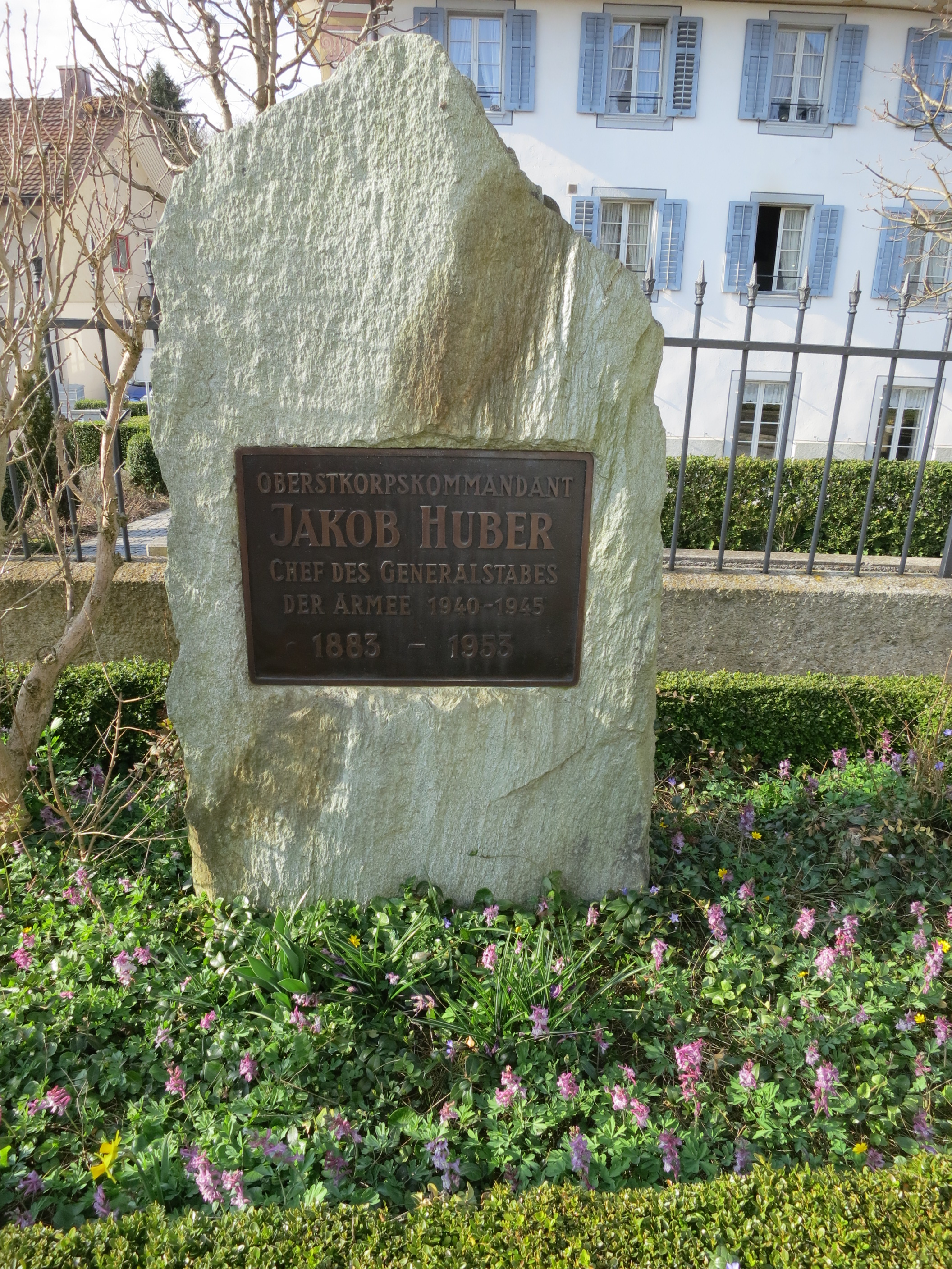 Grabstein, Jonen AG, Schweiz